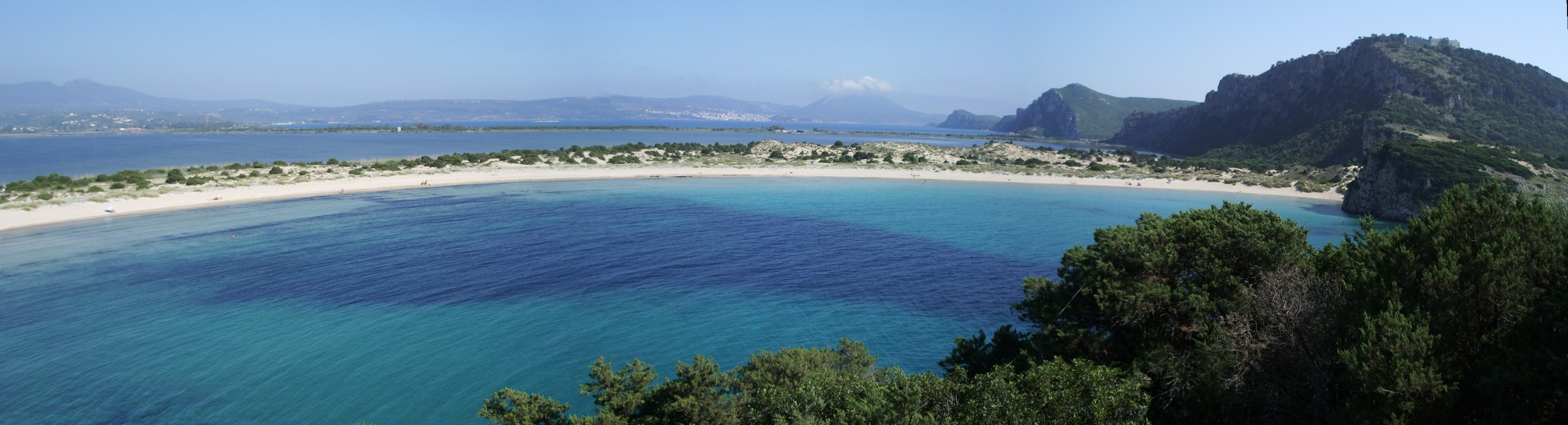 Voidokilia-Bucht ("Omega") im nördlichen Teil der Navarino-Bucht bei Pylos Blick nach Süden; rechts oben das Paliokastro, mittig im Hintergrund liegt Pylos. Es ist etwa die Hälfte der halbkreisförmigen Bucht zu sehen.